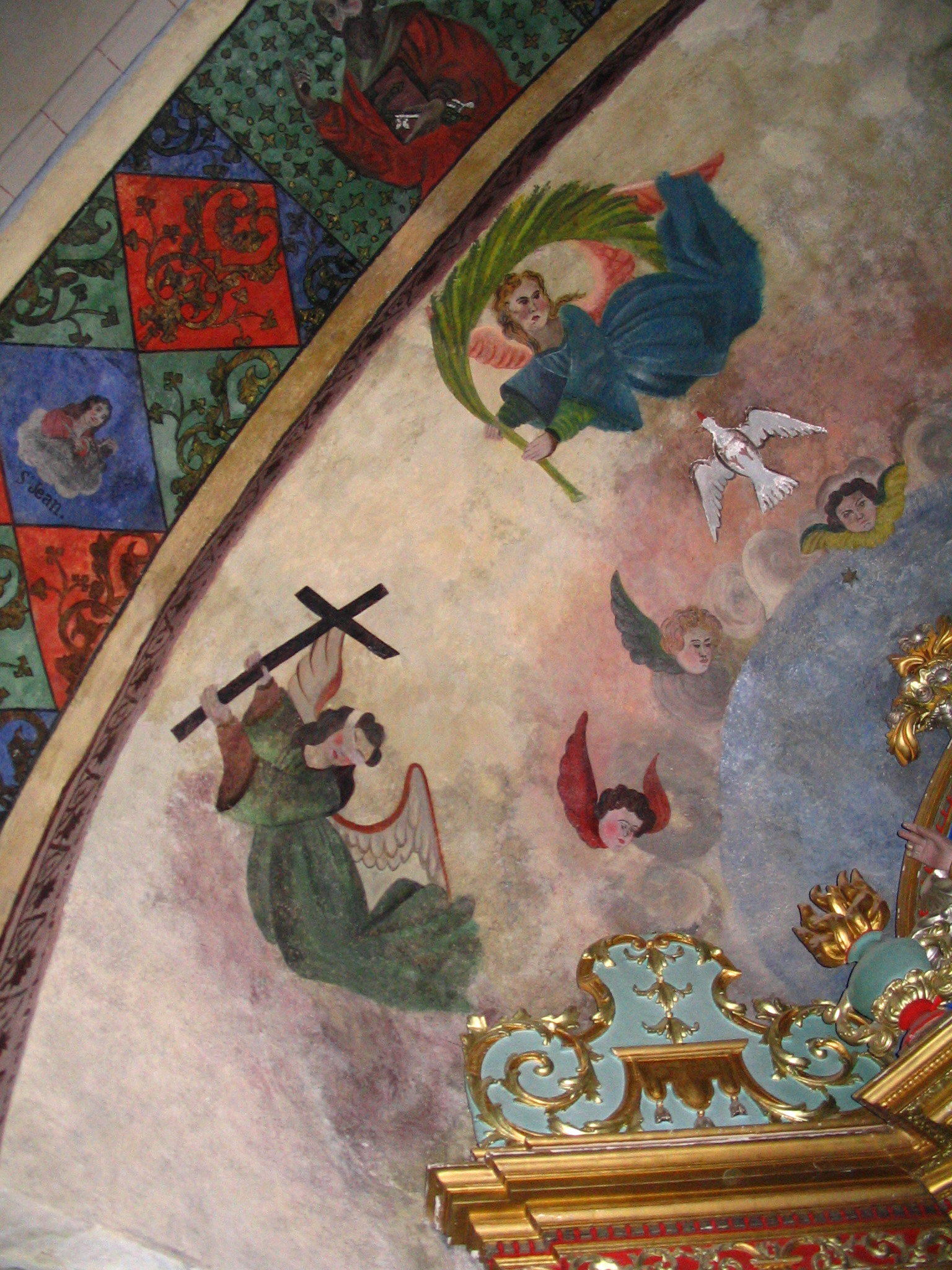 Village de Castet - Pyrénées Atlantiques - France